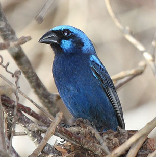 Male Blue Bunting